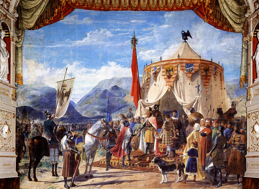 Cagli, Teatro Comunale, Sipario storico di Alessandro Venanzi (1839-1916)